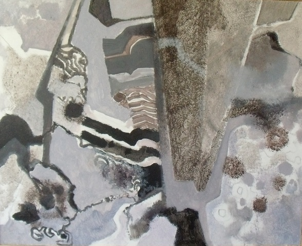 Paroi calcaire, acrylique et sable sur toile